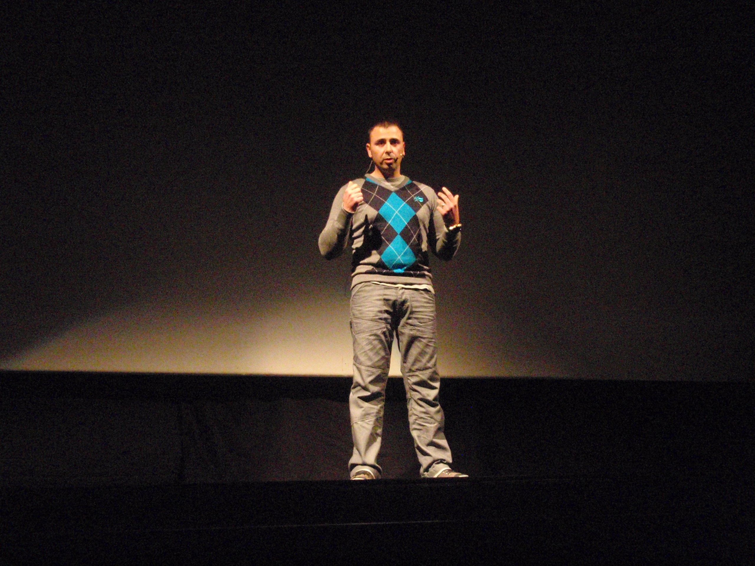 Fran J. Marber presentando su libro durante la gala literaria